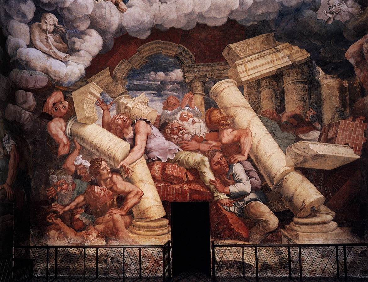 detail